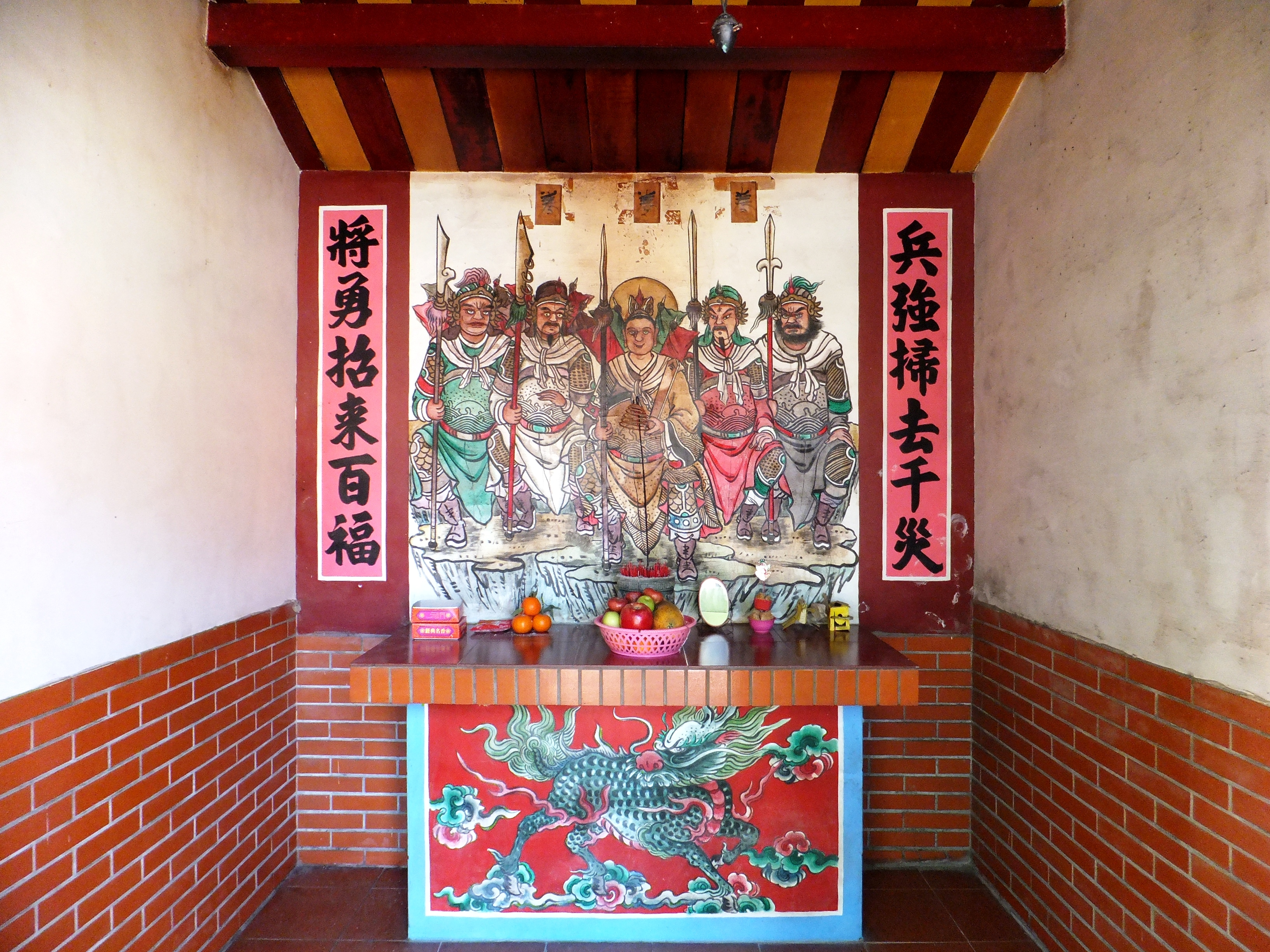 中文（台灣）: 台灣嘉義縣溪口鄉柴林腳的五營神將-中營畫像